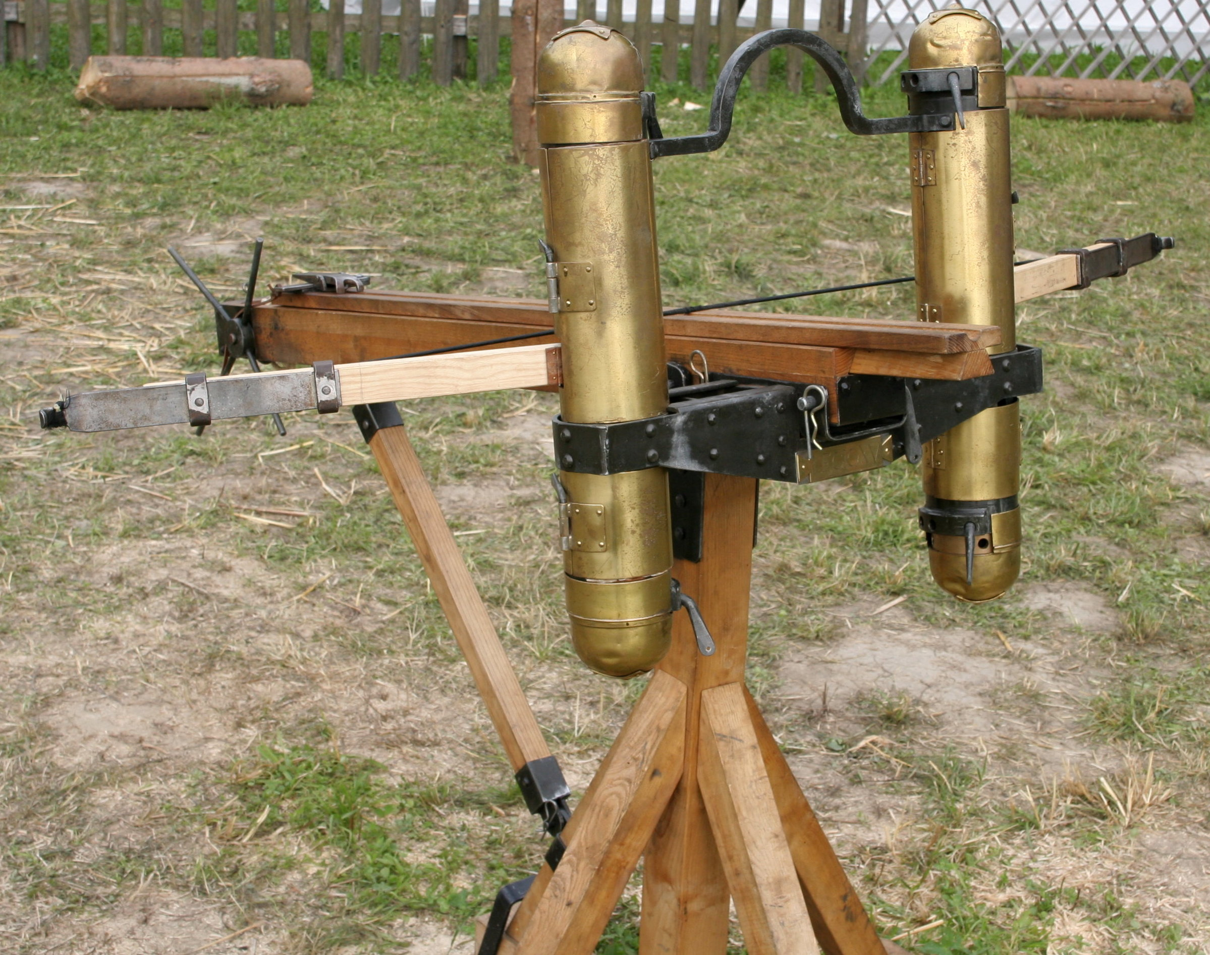 Réplica a escala de una ballista romana. Roman Scorpion Photographed by myself during a show of Legio XV from Pram, Austria